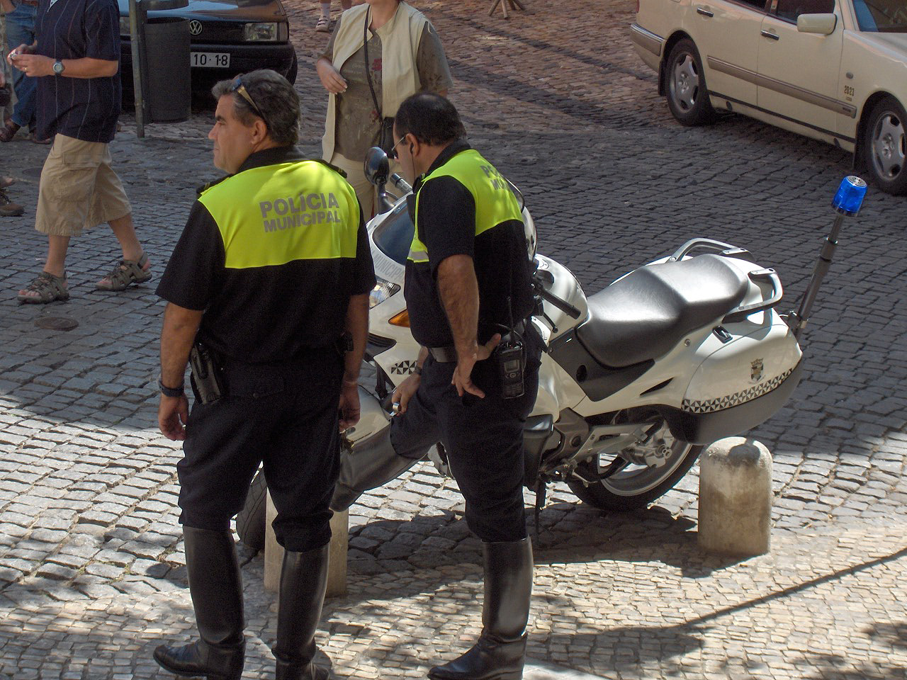 Municipal police; Lisbon, Portugal